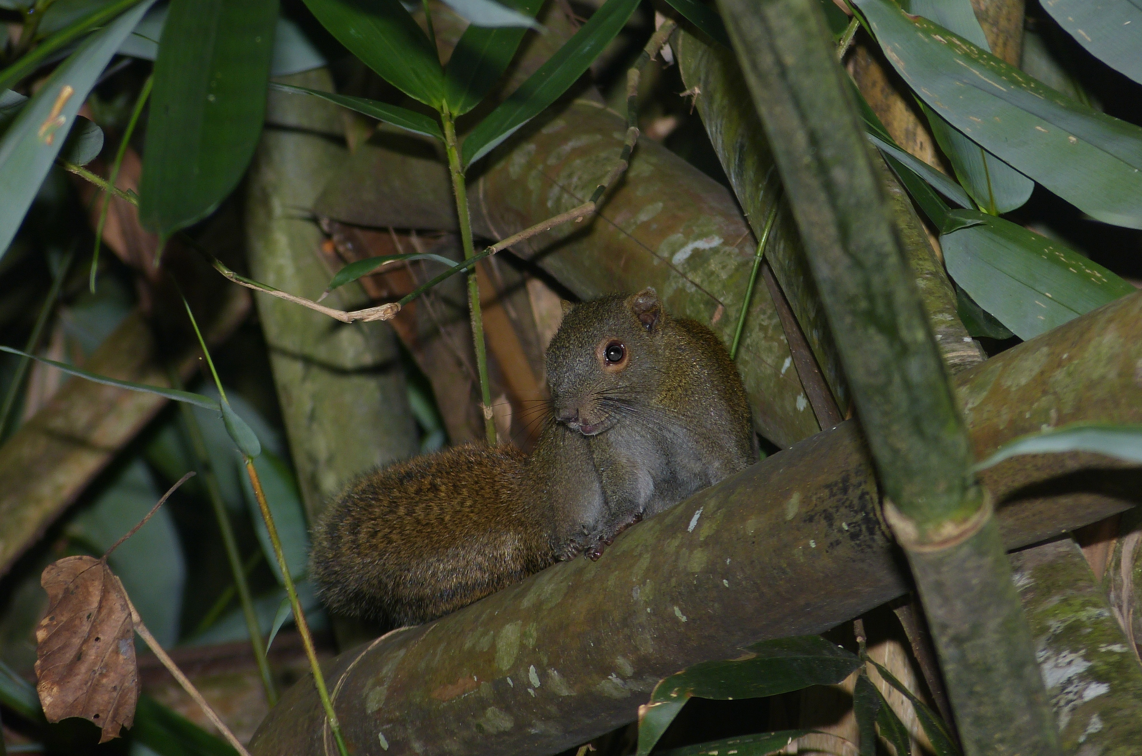 Taman Negara NP, Pahang, MALAYSIA